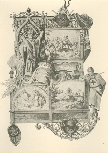 Turaidas Teoderihs kā Igaunijas bīskaps (kreisajā pusē). Zem viņa attēla bīnumainā izglābšanās no nāves ar pagāniskā „likteņzirga” palīdzību. Romas pāvestam dāvātā albuma "Terra Mariana" lapa.